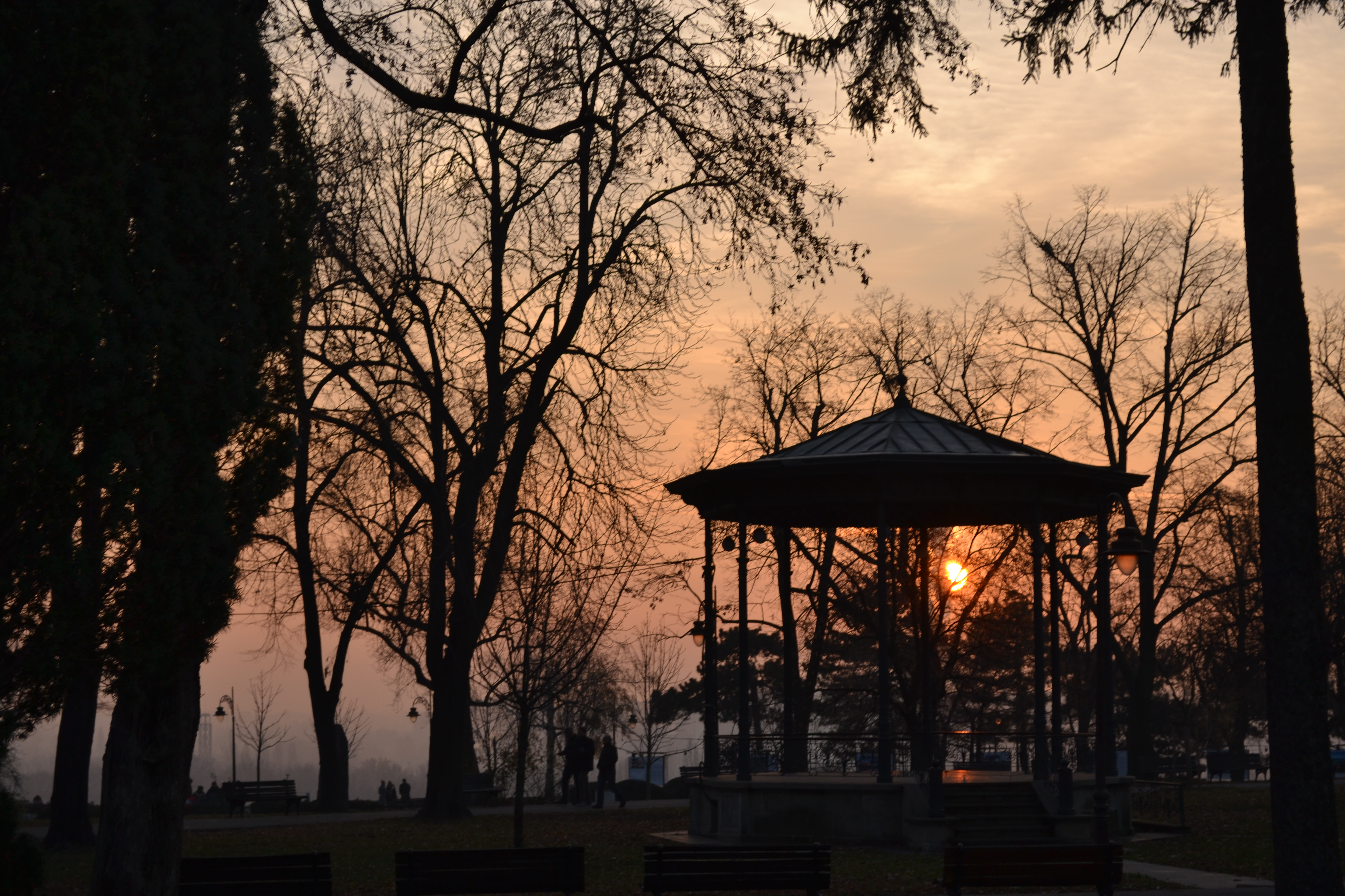 Kalemegdan (Kyrillisk: Калемегдан) er en festning med et tilliggende parkområde i Beograd, Serbias hovedstad. Navnet Kalemegdan, som brukes både på festningen og på hele parkområdet, stammer fra to tyrkiske ord, kale (festning) og megdan (felt, område).